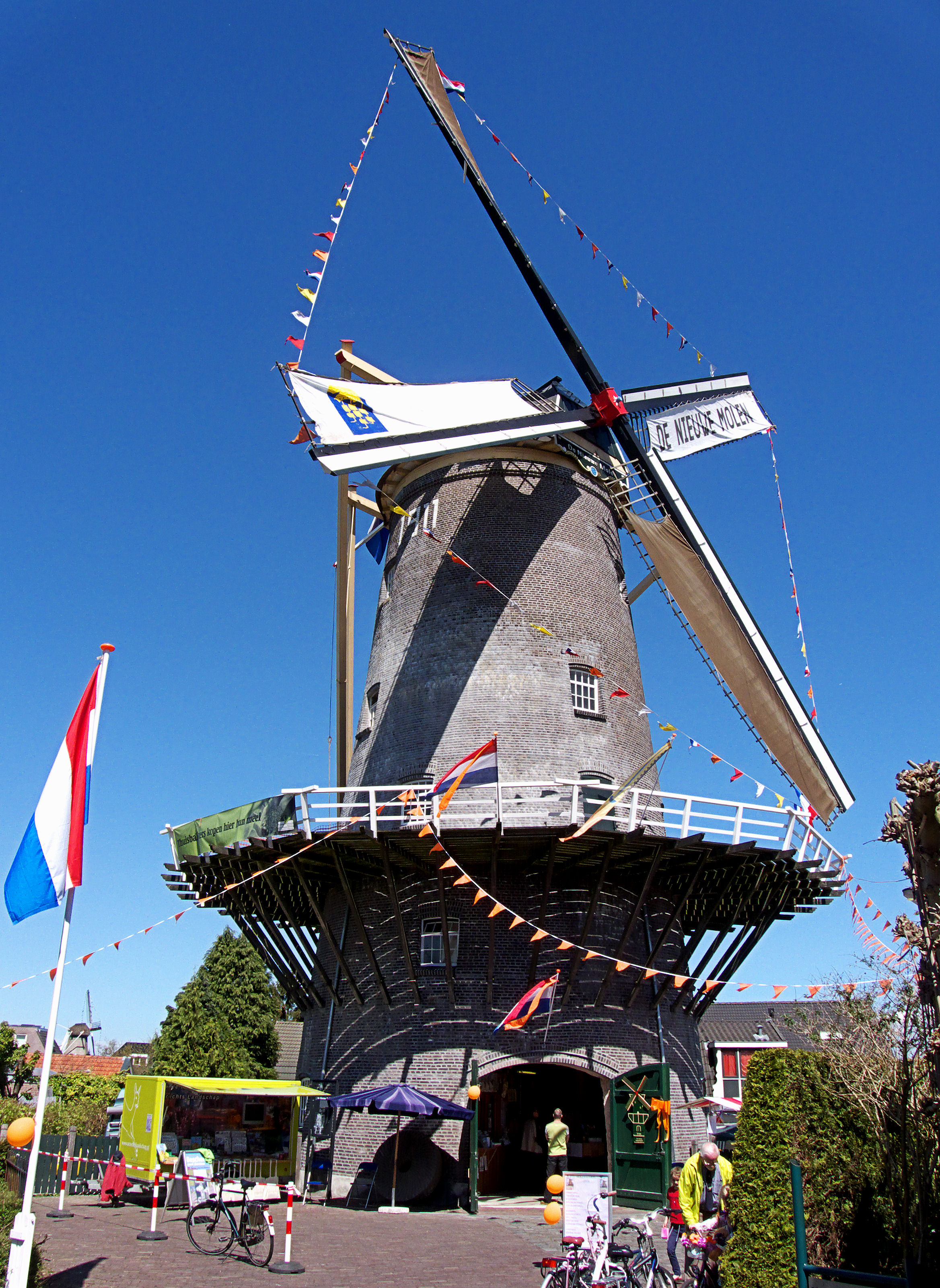 Molen de Nieuwe molen Veenendaal Koninginnedag 2012